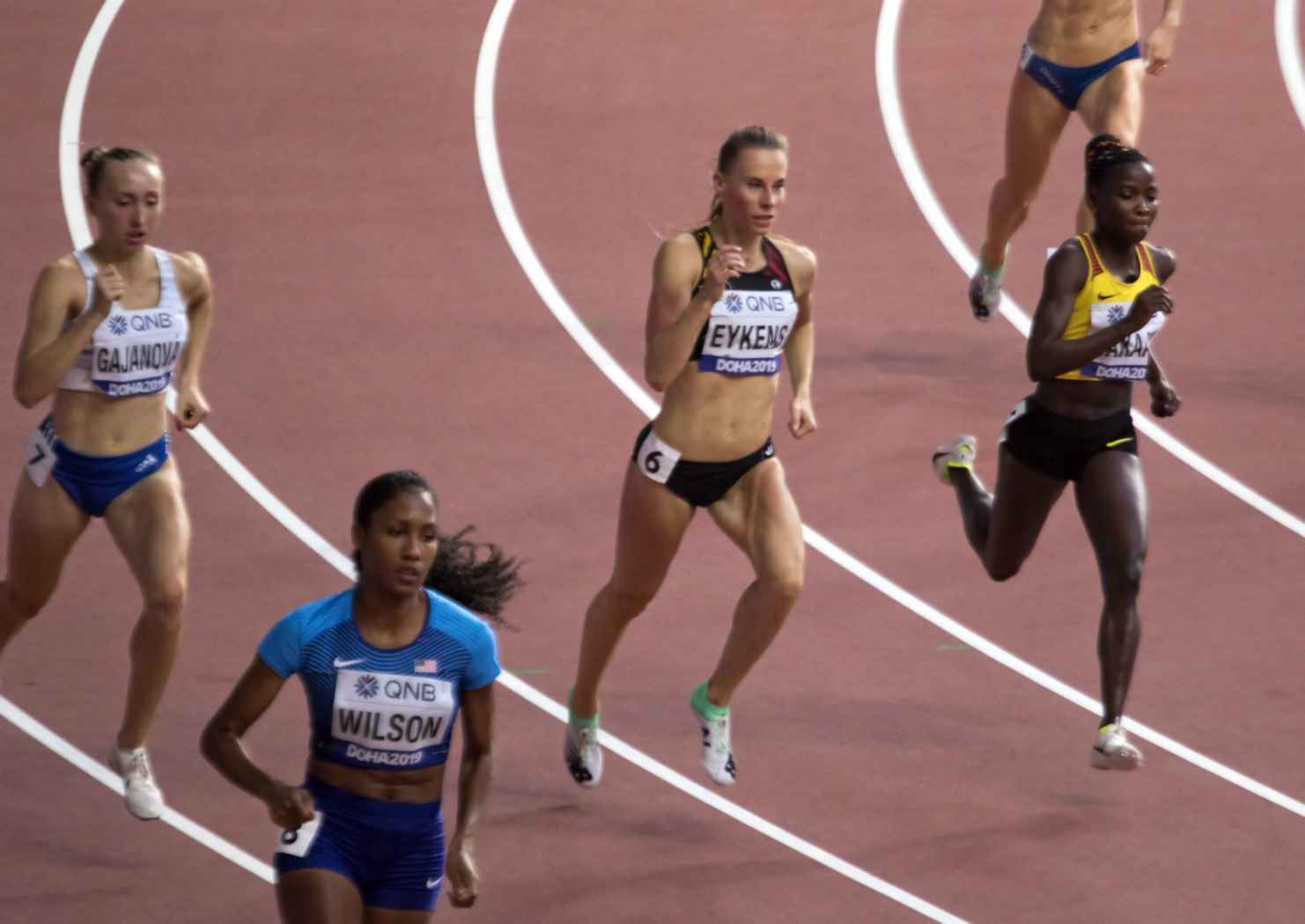 DOH10004 eykens reeksen 800m